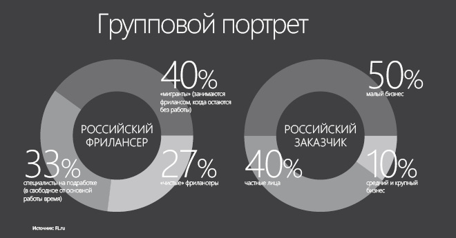 Фриланс в России - фрилансеры и заказчики